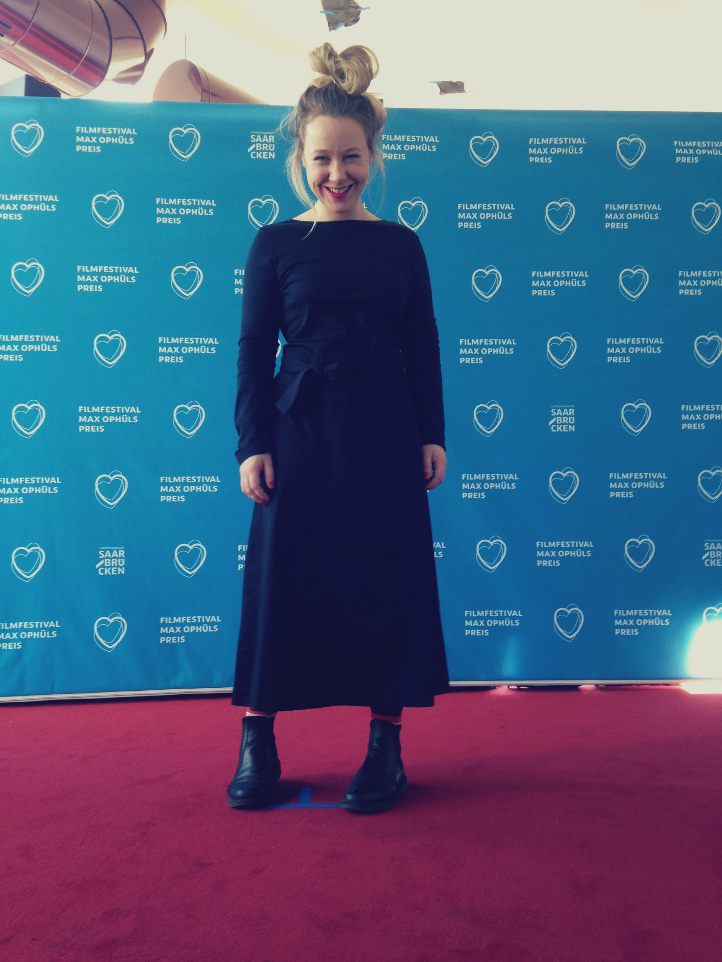 beim FestivalMax Ophüls Preis 2019